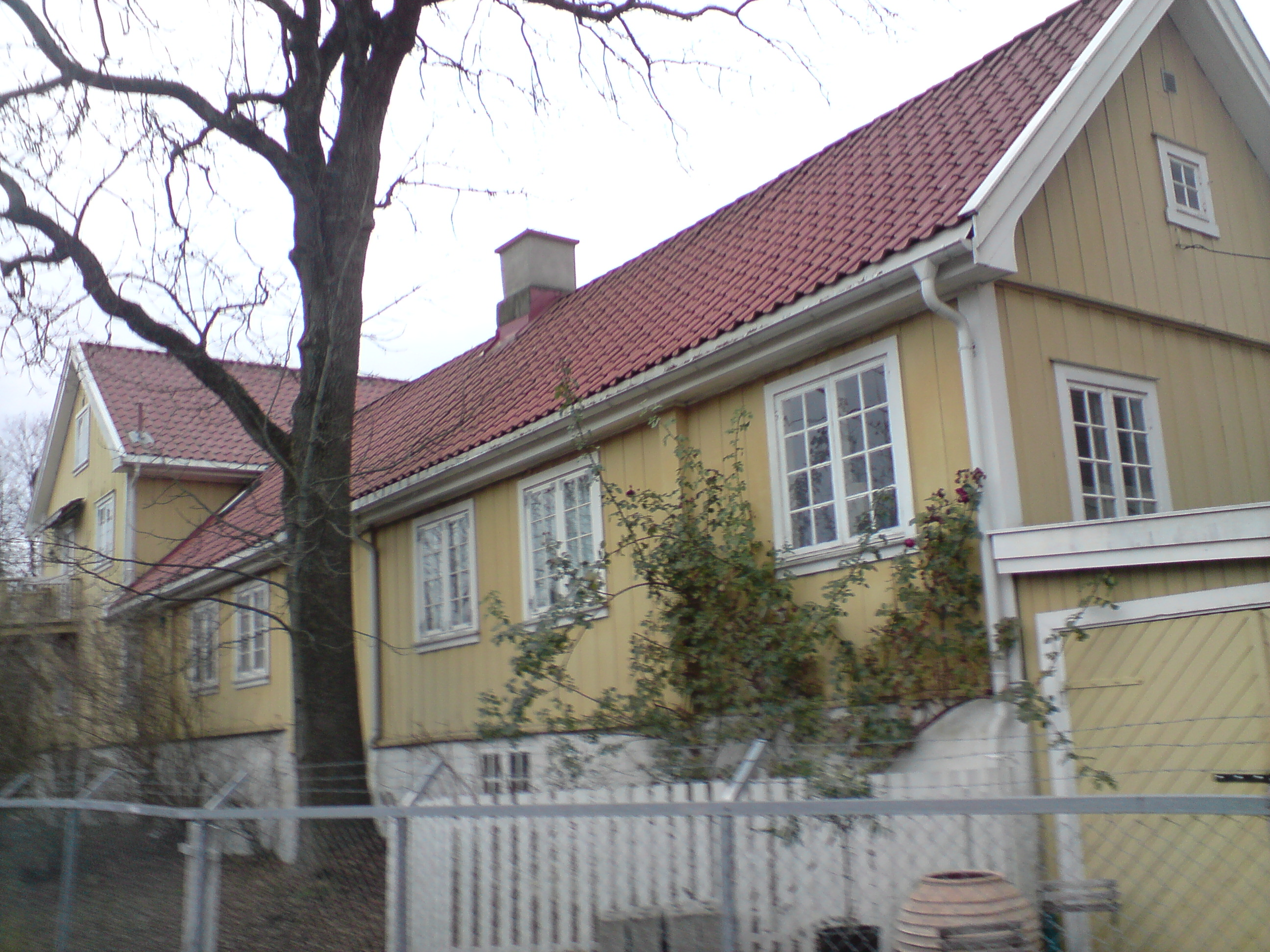 Østre Stabekk gård